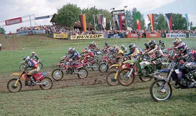 Start des 500ccm-Motocross-Rennens 1999 in Gaildorf.